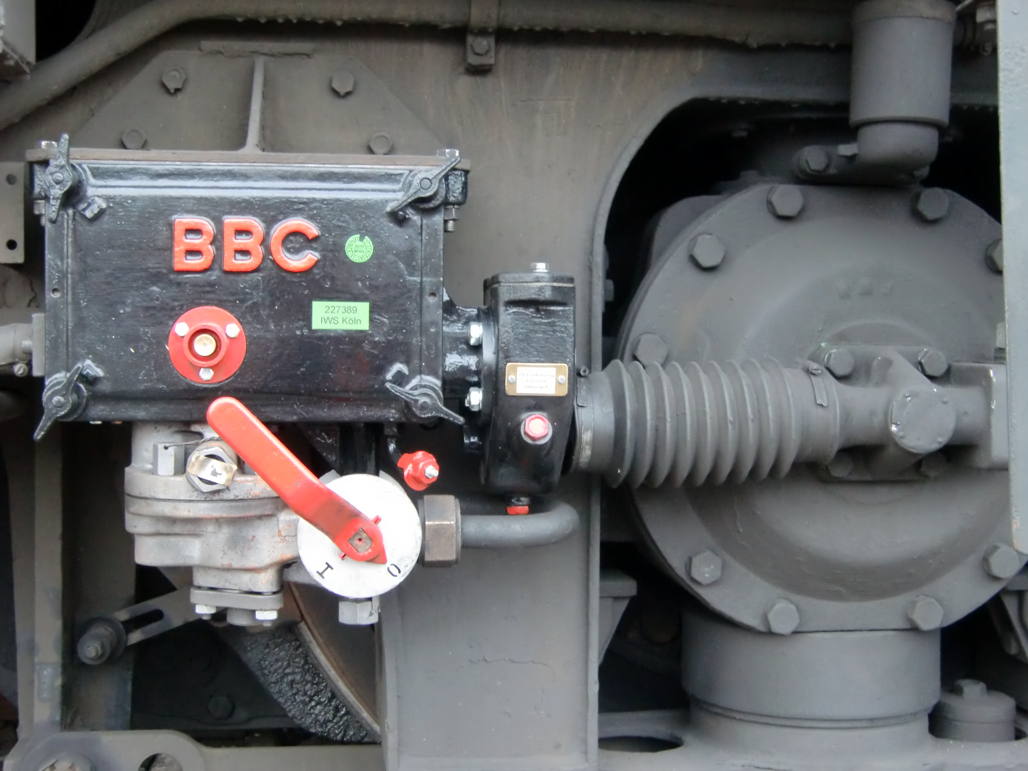 Sicherheitsfahrschalter (Sifa) von BBC an einer Lok der Baureihe 110 der Deutschen Bahn.